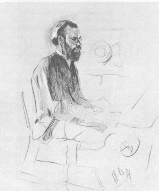 Художник Илья Семёнович Остроухов за роялем. 1886. Бумага, графитный карандаш. 27,8 x 23,2. Справа подпись: ВС. Ниже авторская надпись: И.О.Абрамцево 86. Третьяковская галерея (с 1929)